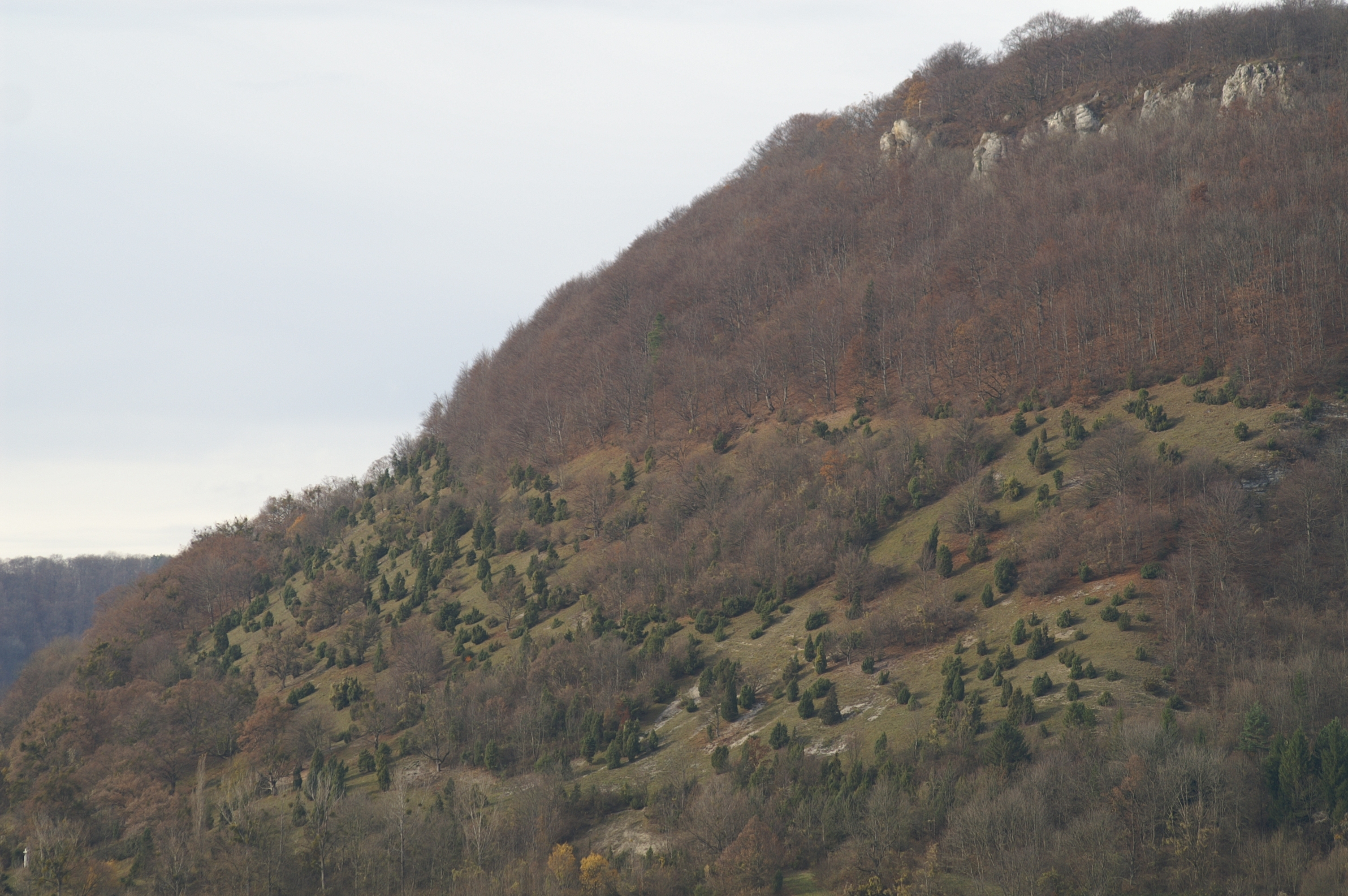 Blick von Ave Maria ins Obere Filstal mit Wacholderheiden am Nordrand (Naturschutzgebiet „Nordalbhänge: Ottenwang-Ungerhalde-Sommerberg“ in Deggingen). Im Oberen Filstal zwischen Geislingen/Steige und Wiesensteig gibt es mehrere ökologisch sehr wertvolle Wacholderheiden.